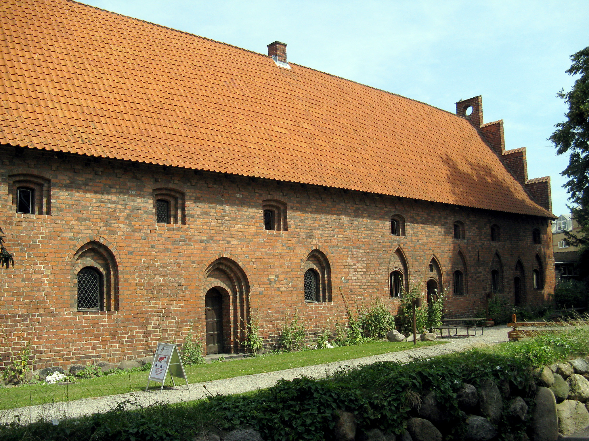 Helligaandshuset i Næstved